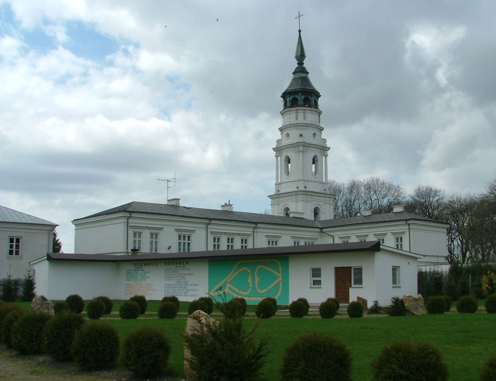 Chełm - Sanktuarium Maryjne na Górze Chełmskiej